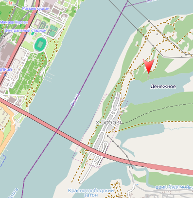 Расположение Волгоградского дебаркадера (отмечен красным) в окрестностях Волгограда на карте OpenStreetMap. This map of Volgograd was created from OpenStreetMap project data, collected by the community. This map may be incomplete, and may contain errors. Don't rely solely on it for navigation.